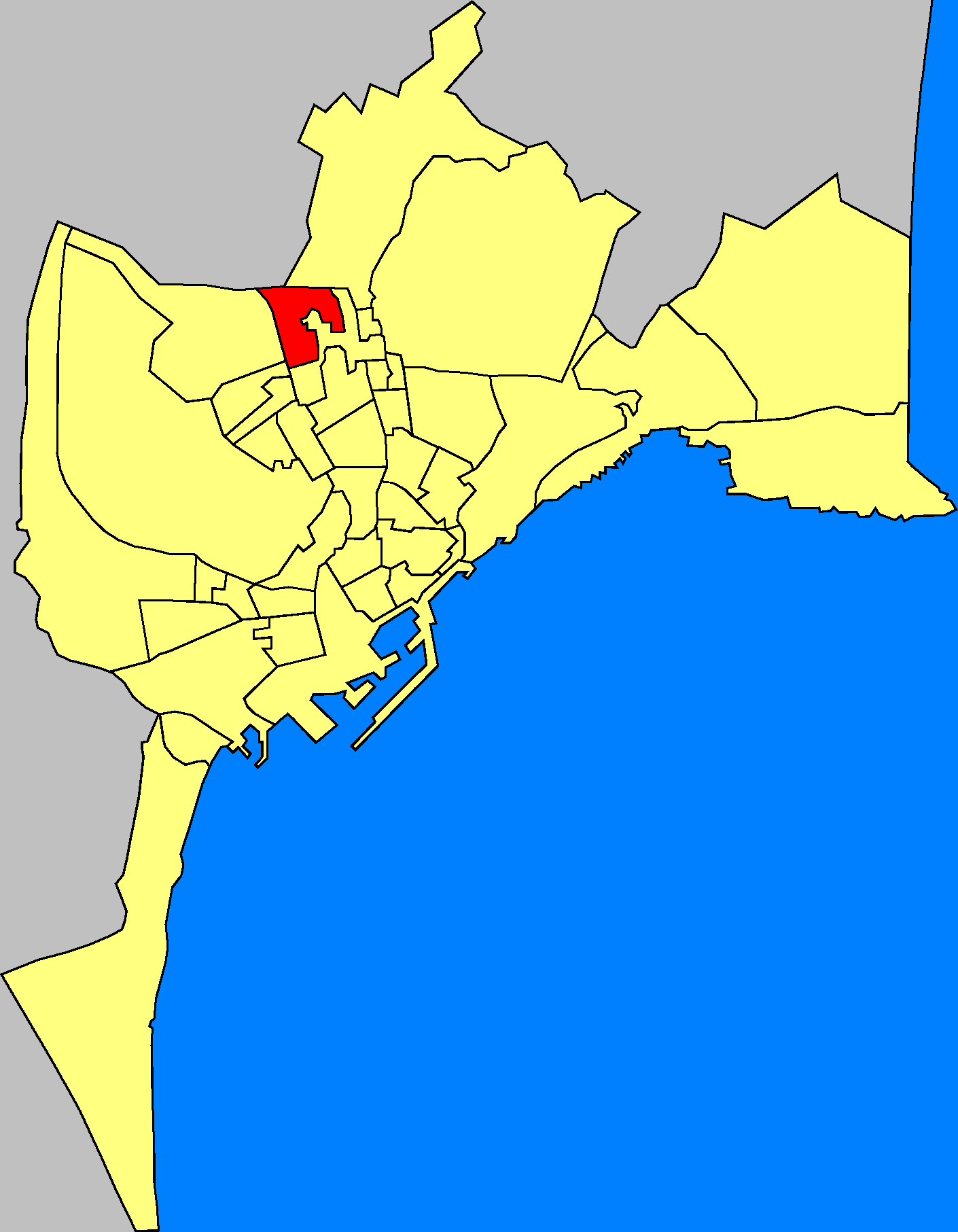 Barrios de la ciudad de Alicante